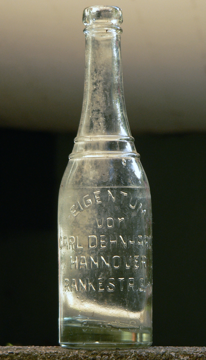 Wasserflasche Carl Dehnhardt Hannover Rankestr.3/4